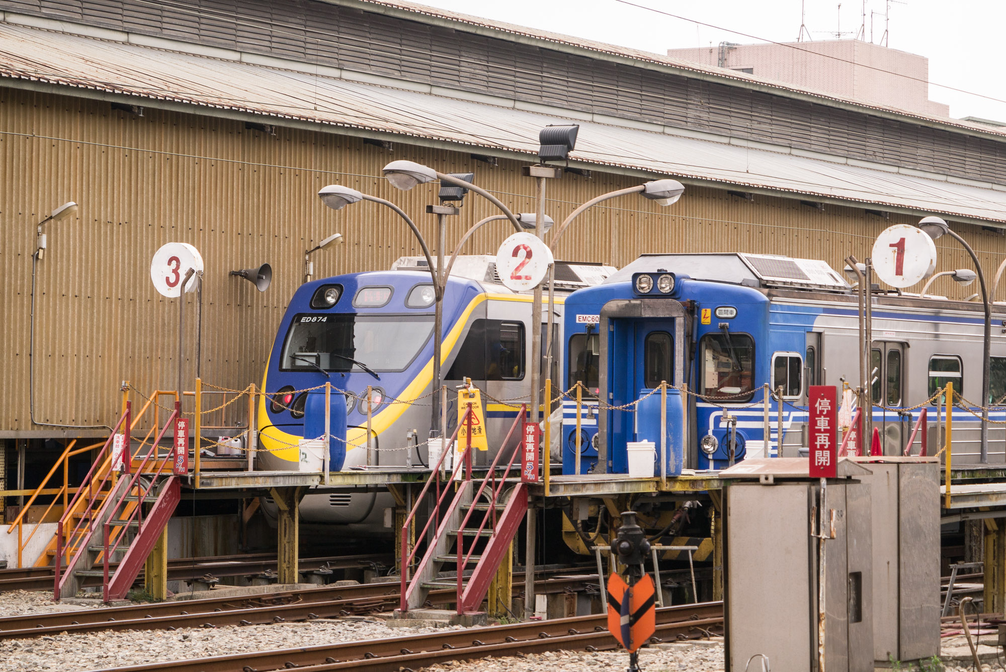 臺灣鐵路管理局EMU800型電聯車ED874與EMU600型電聯車停靠新竹車站。